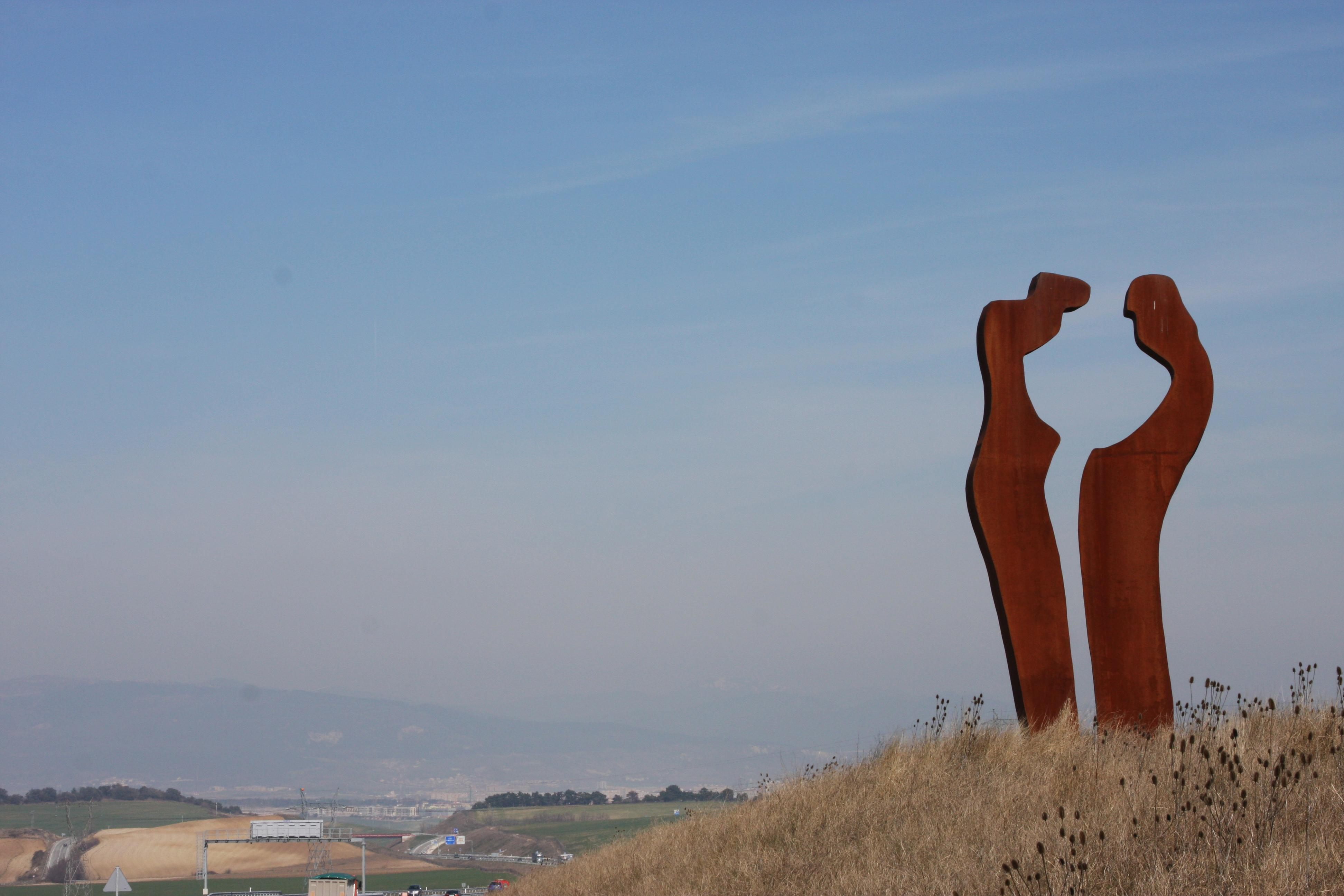 Obra Monumental